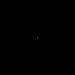 TFF